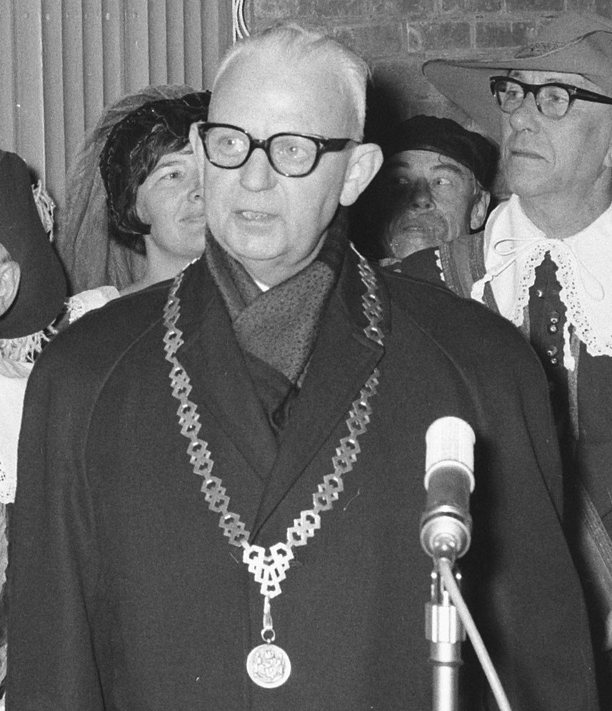 De fa. Visser binnenvaartrederij in de Rijp, begon 300 jaar geleden geregelde dienst op Amsterdam, burgemeester Daalenberg onthulde gedenksteen